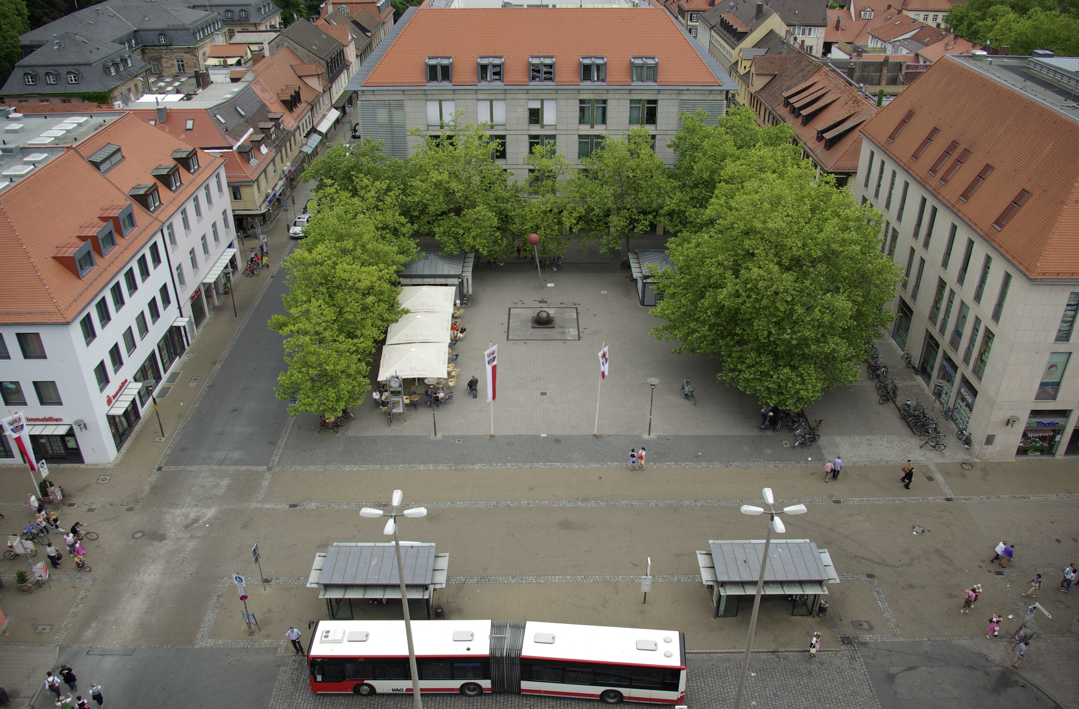 Blick vom Turm der Hugenottenkirche auf den östlichen Teil des Hugenottenplatzes in Erlangen